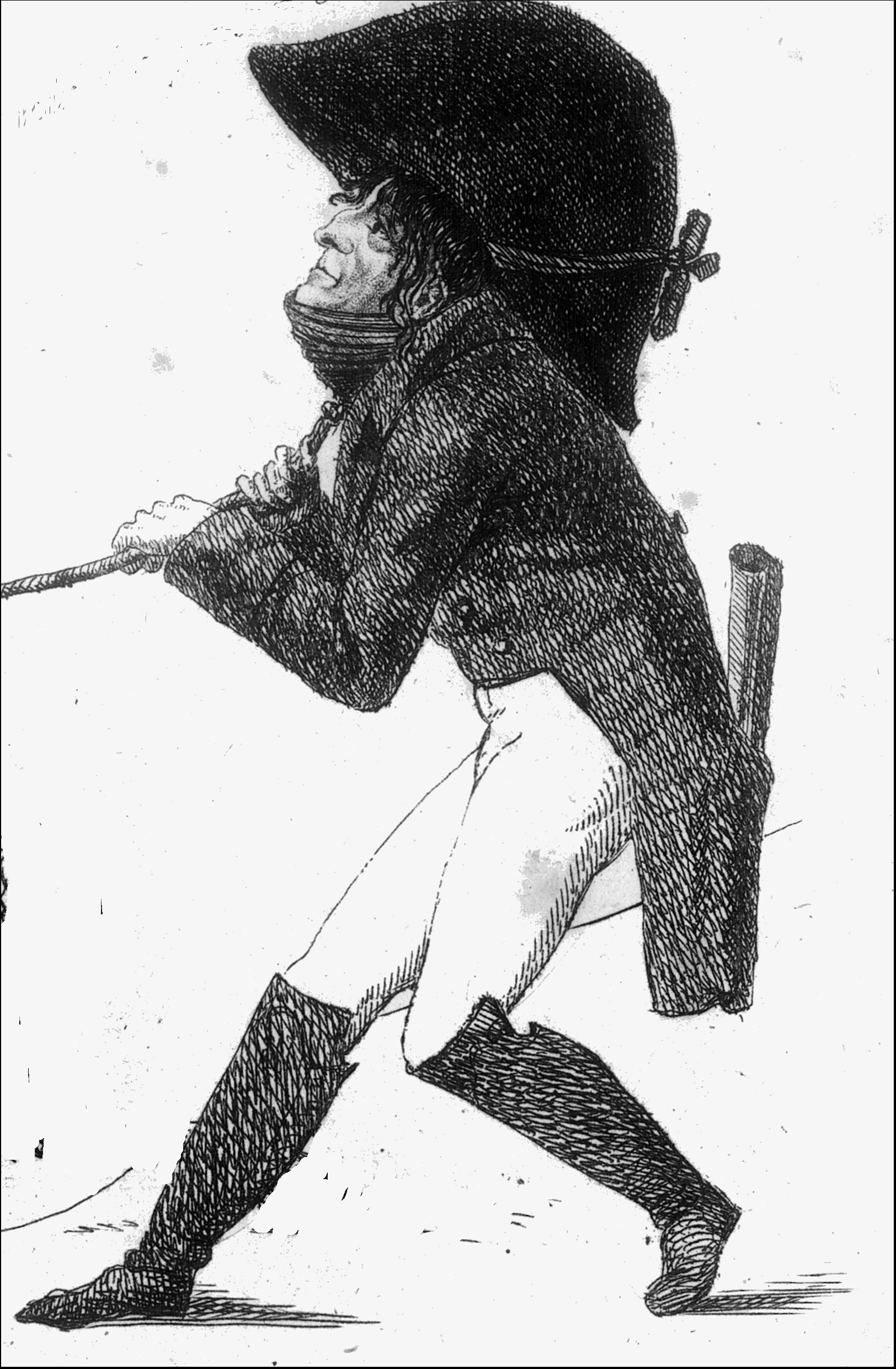 Karikatur von Simson Alexander David (Karl Julius Lange), Berlin Dezember 1808